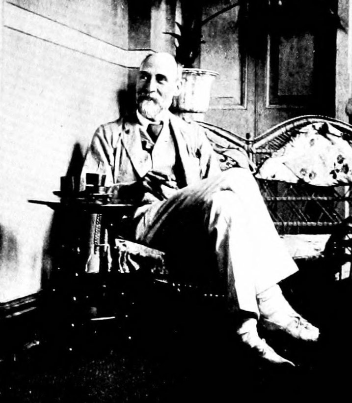 Edward Hamilton Aitken